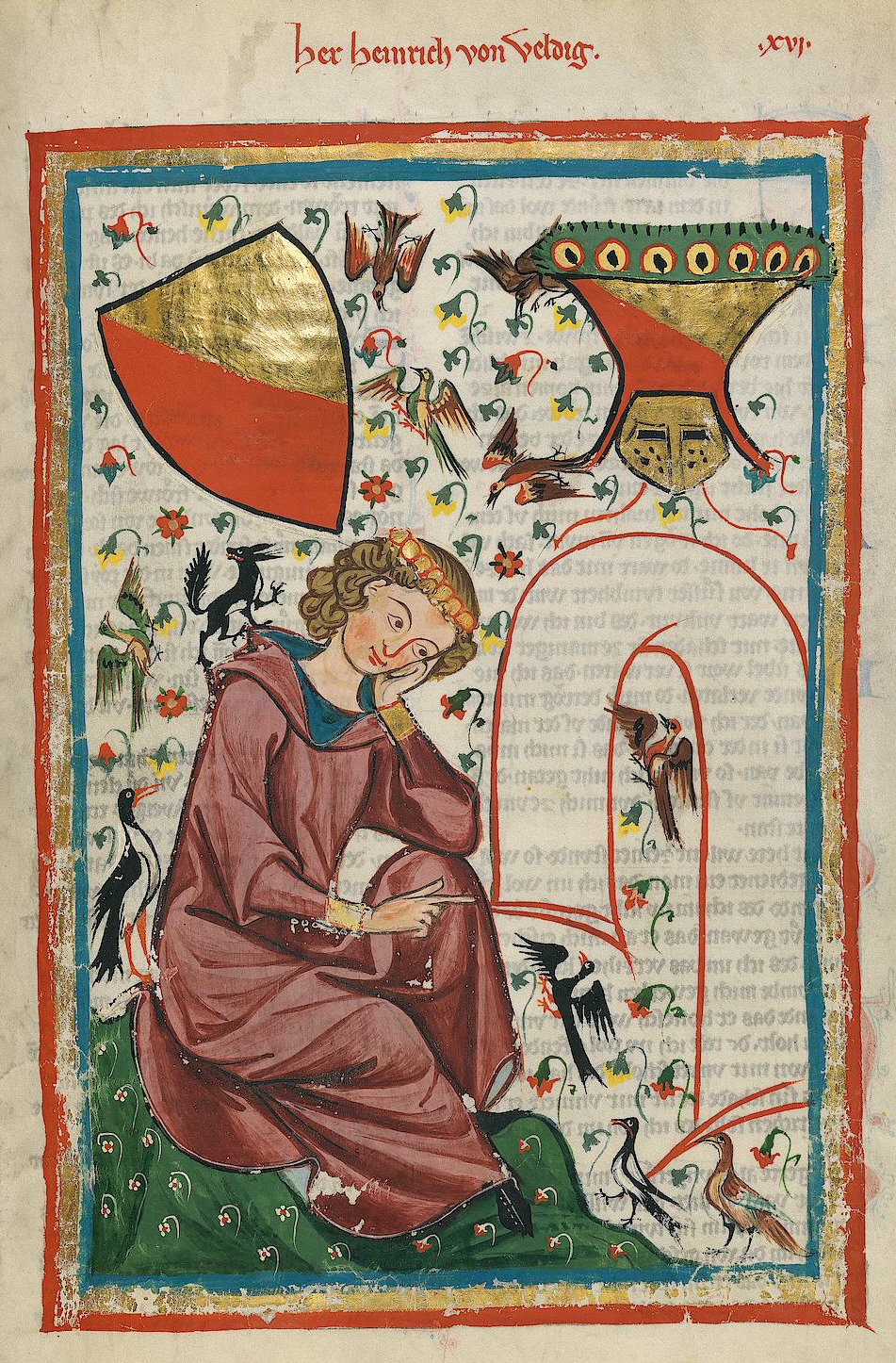 Codex Manesse, UB Heidelberg, Cod. Pal. germ. 848, fol. 30r, Herr Heinrich von Veldeke